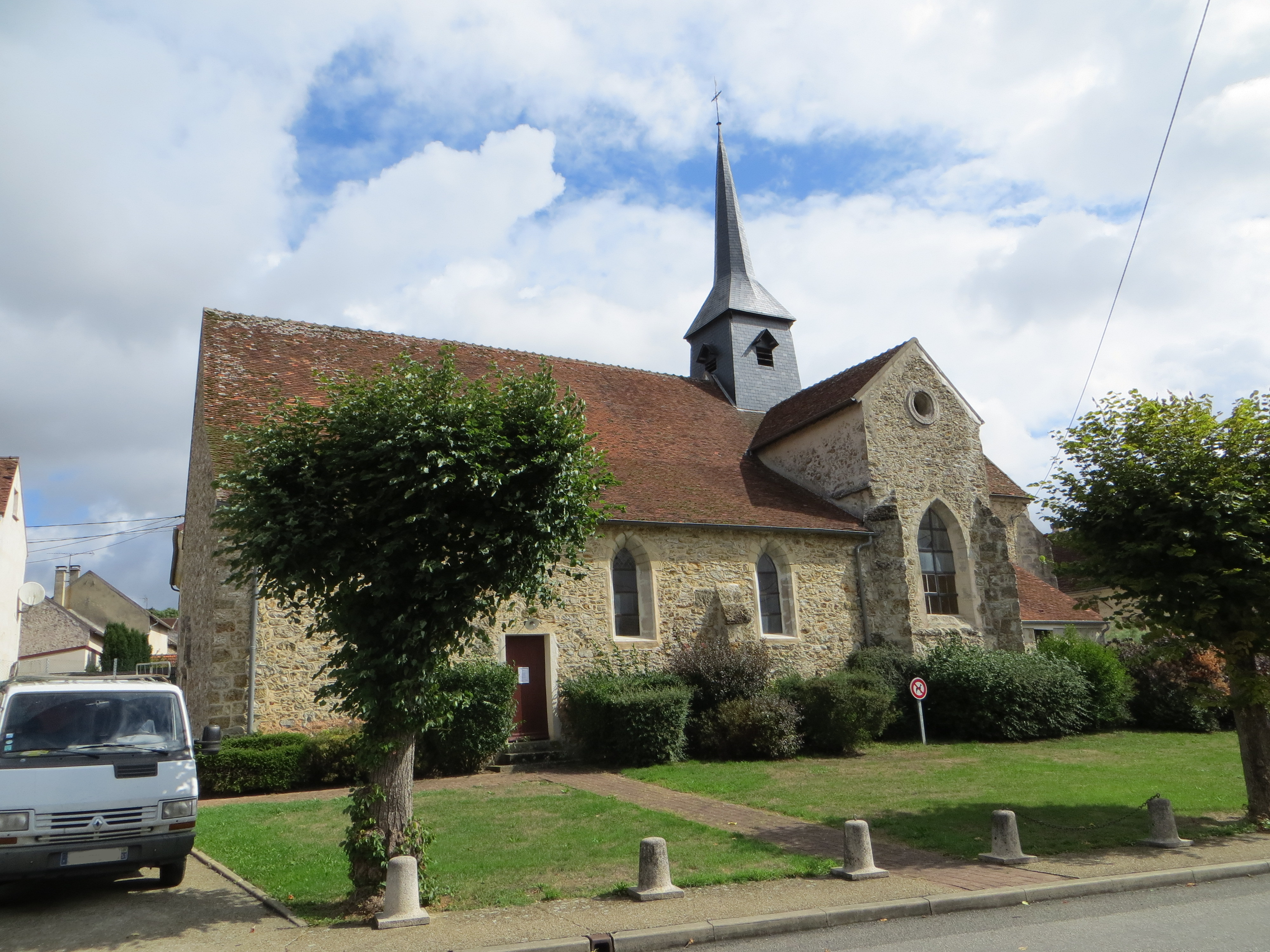 Vue de l'église